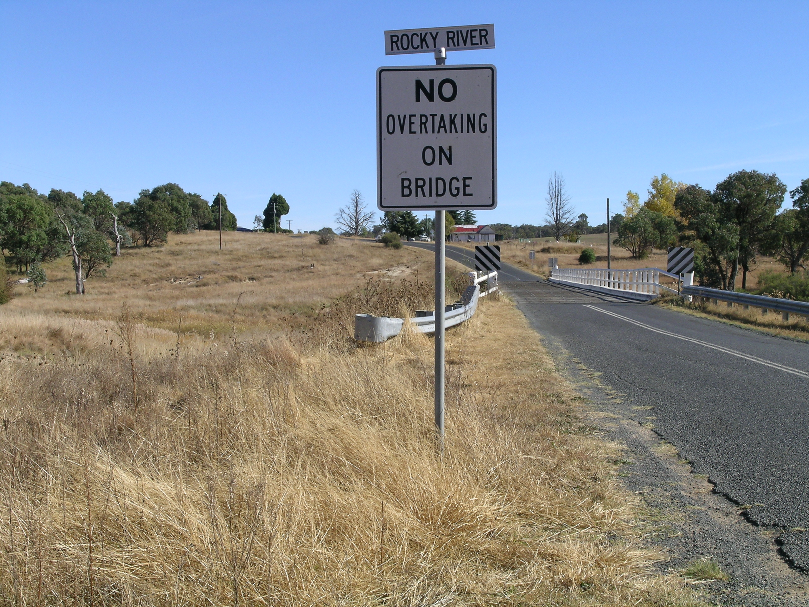 Rocky River, Uralla, NSW